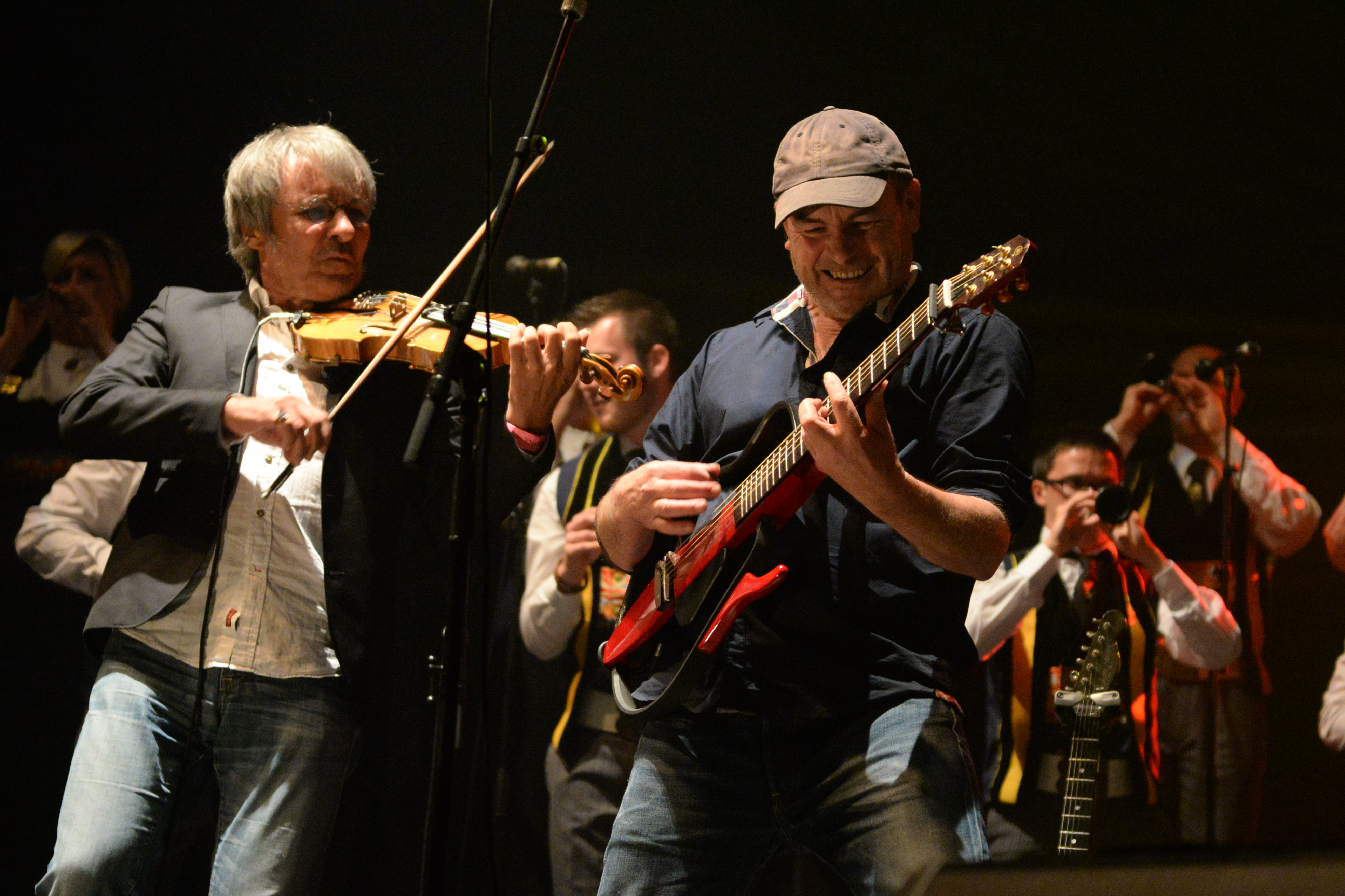 Concert de Red Cardell du 8 août 2014 au Festival Interceltique de Lorient 2014